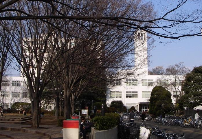 東京学芸大学 人文社会科学系研究棟 撮影者：Ans 2006.01.30